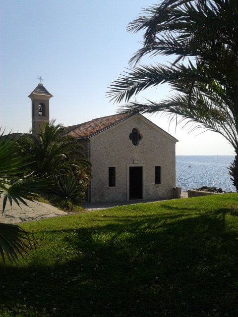 La façade de l'église de Sant'Ampelio